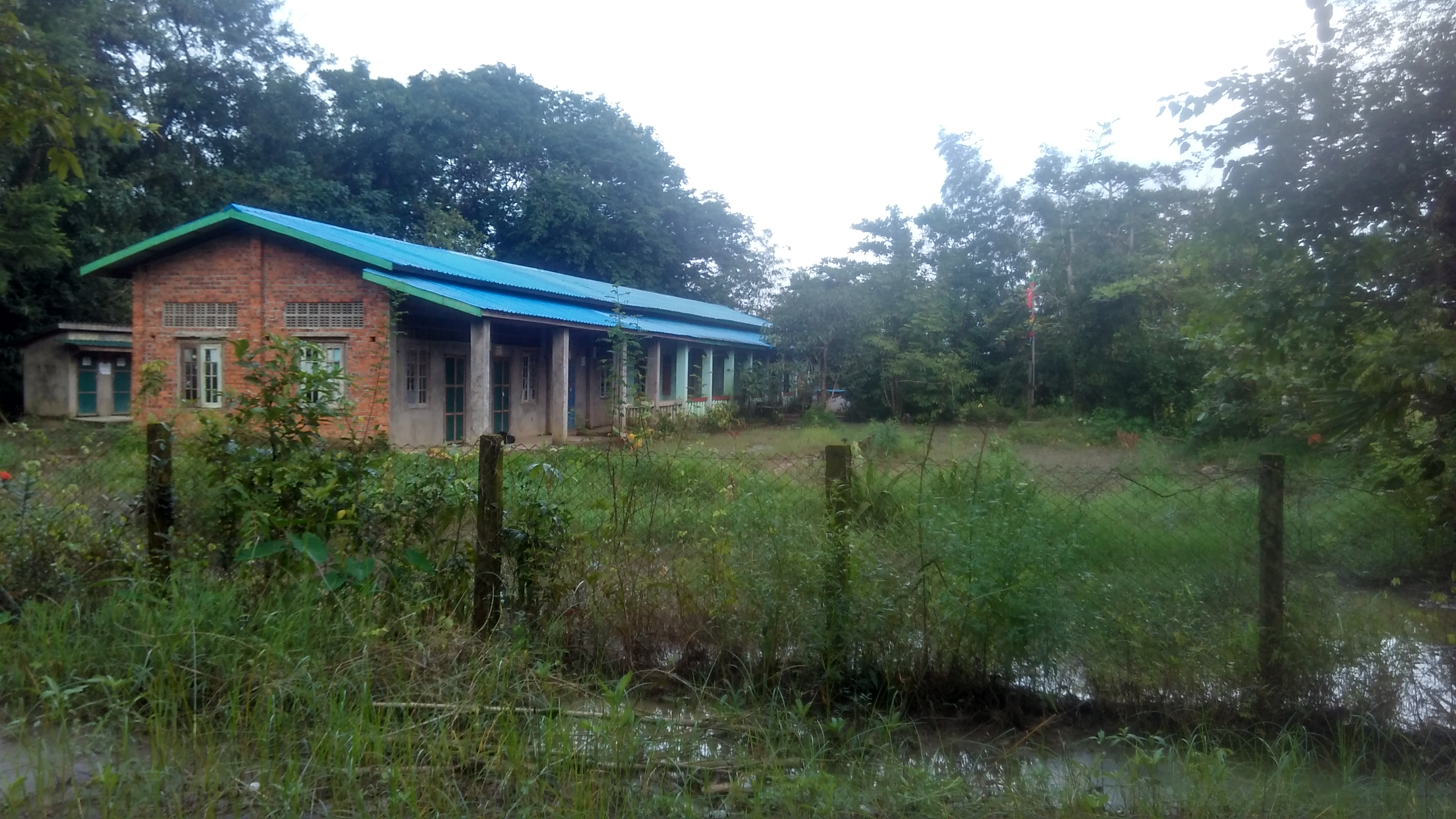 မြန်မာဘာသာ: အခြေခံပညာမူလတန်းလွန်ကျောင်း၊ သပြေကန်။ ပဲခူးတိုင်း‌ဒေသကြီး၊ ကဝမြို့နယ်၊ သပြေကန်ရွာတွင် တည်ရှိသည်။